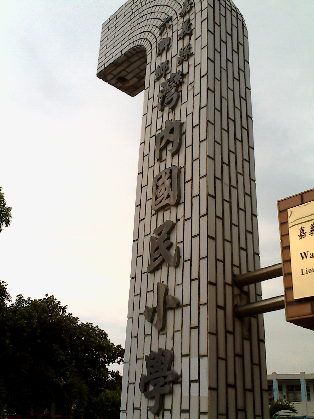 嘉義縣六腳鄉灣內國小。